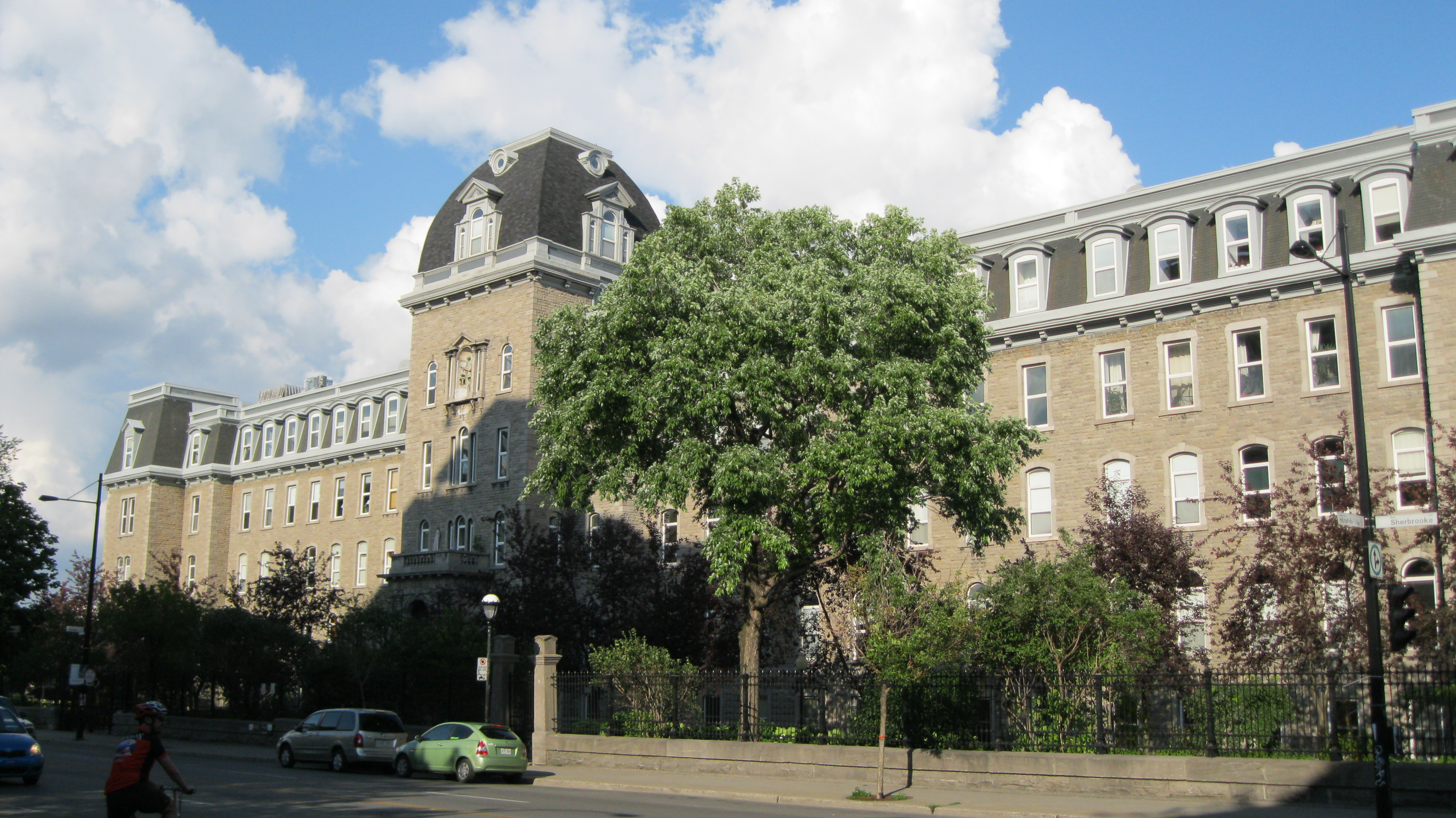 Ancien collège du Mont-Saint-Louis, 230 rue Sherbrooke Est, Montréal